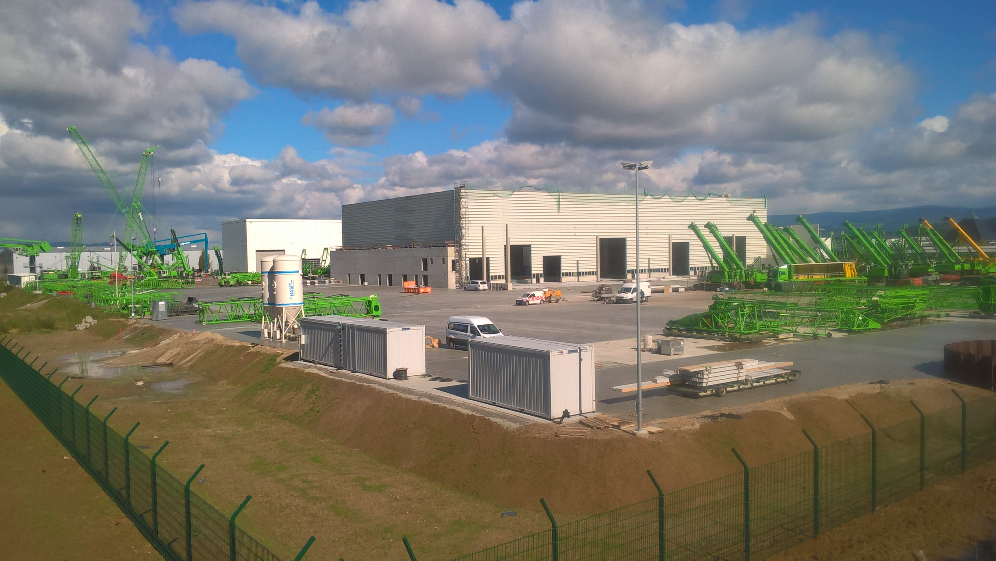 Erweiterung des Werksgeländes der Fa. Sennebogen im Industriegebiet Straubing-Sand